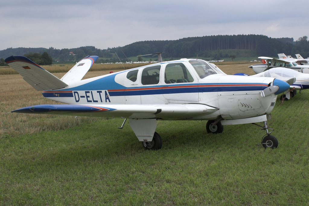 Beechcraft 35 Bonanza D-ELTA